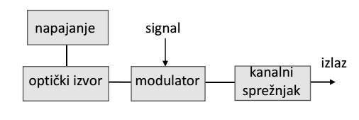 Блок шема оптичког предајника